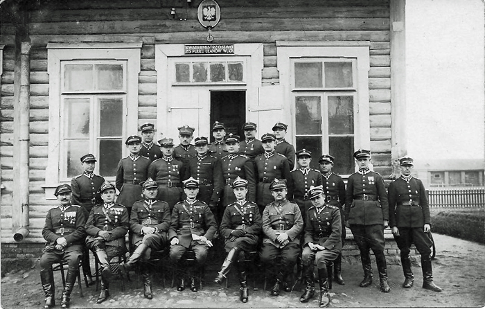 Беларуская (тарашкевіца): 25-ы полк вялікапольскіх уланаў у Пружане